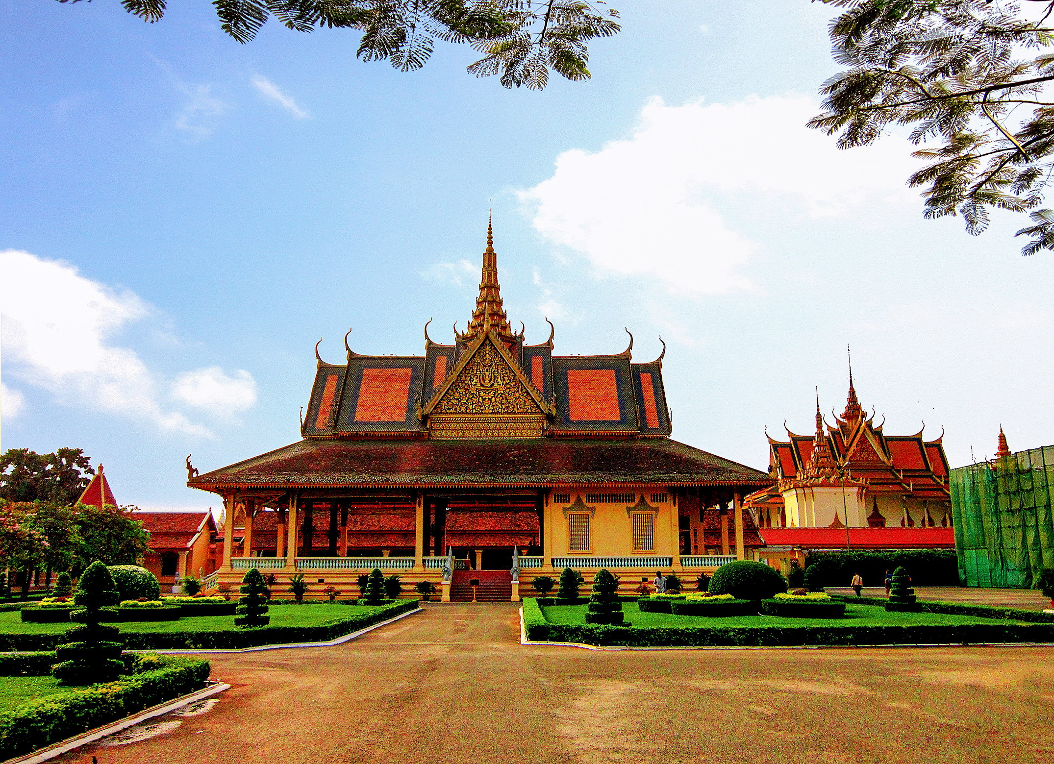 Một cung điện trong Cung điện Hoàng gia Campuchia ở Phnom Penh.